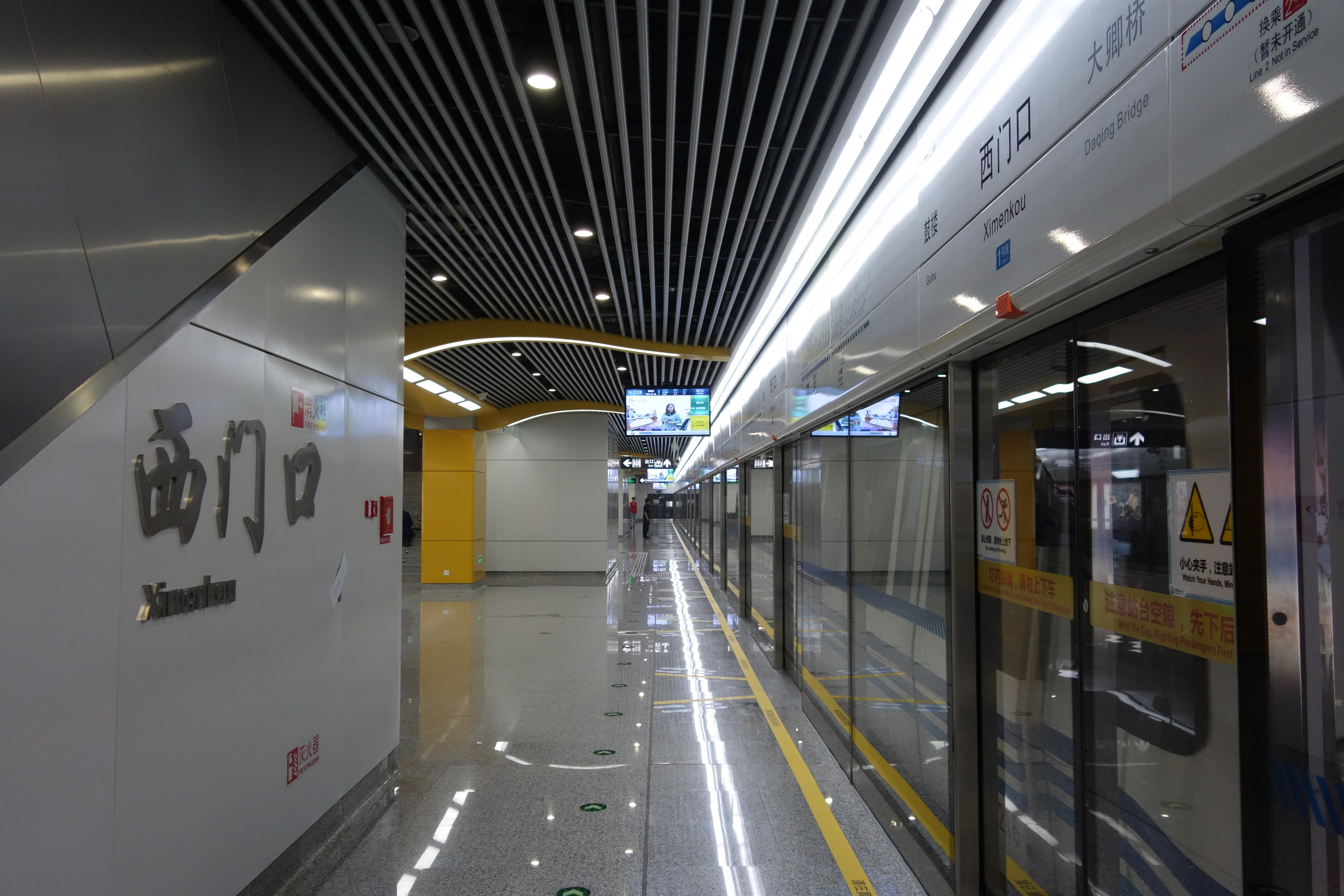 宁波地铁西门口站站台